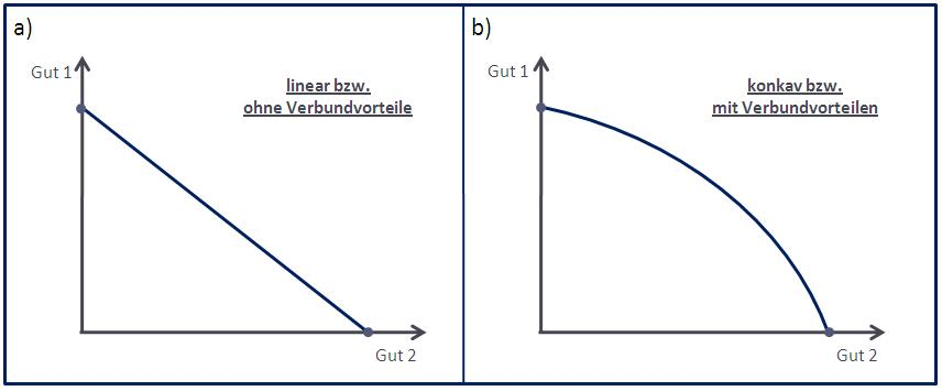 Arten von Transformationskurven